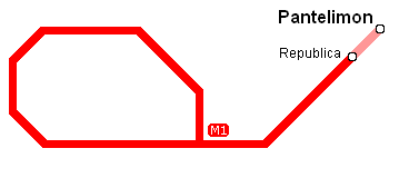 Situering Pantelimon aan Metrolijn 1 in Boekarest. Bron: :Afbeelding:Kaart metrolijn 1 situering Dristor Boekarest.PNG